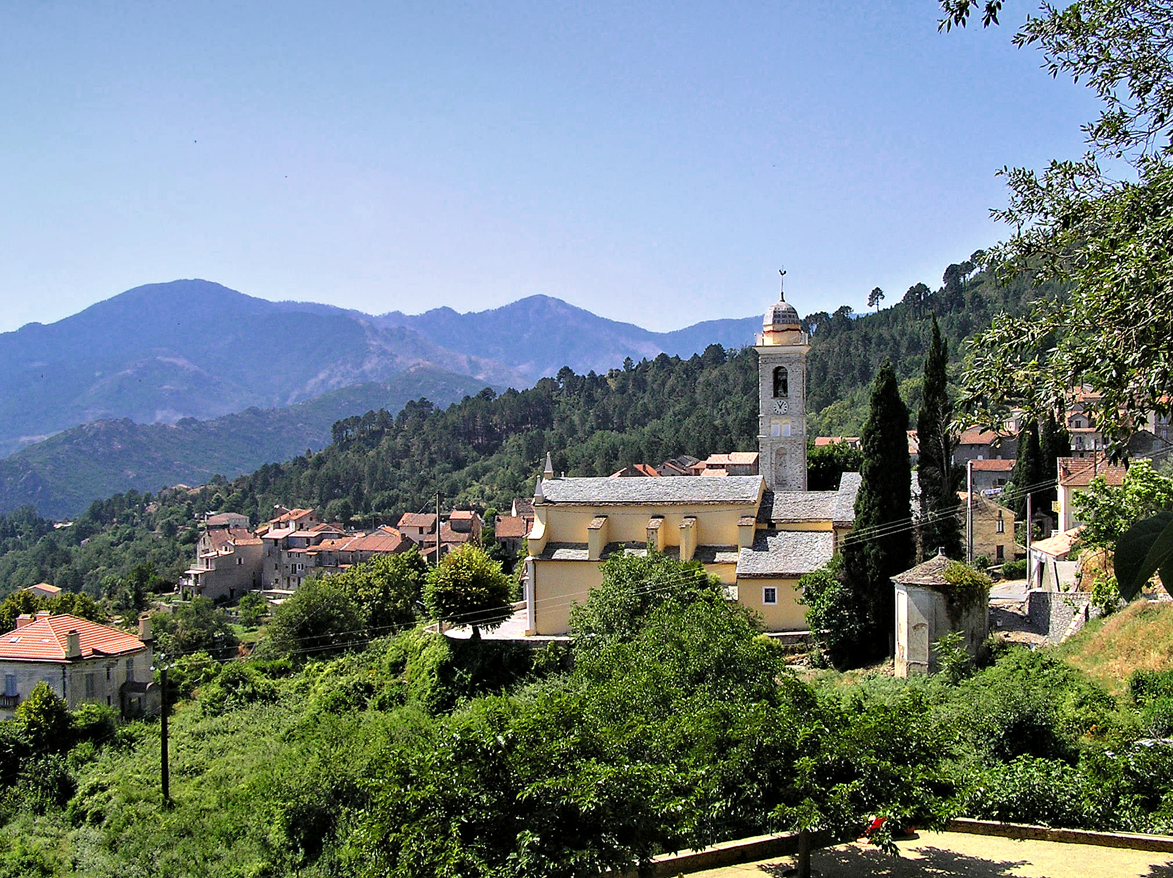 Venaco, Centre Corse - Église paroissiale Saint-Michel